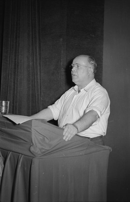 Erfurt, SED-Parteiaktivtagung, Erich Mückenberger ADN-Zentralbild/TBD 1.8.1953 Parteiaktivtagung der SED am 29.7.1953 in Erfurt UBz: Den 1. Bezirkssekretär der SED, Genosse Erich Mückenberger, während seines Referates auf der Parteiaktivtagung in Erfurt am 29.7.1953. Abgebildete Personen: Mückenberger, Erich: Sekretär des ZK der SED, Volkskammerabgeordneter, DDR